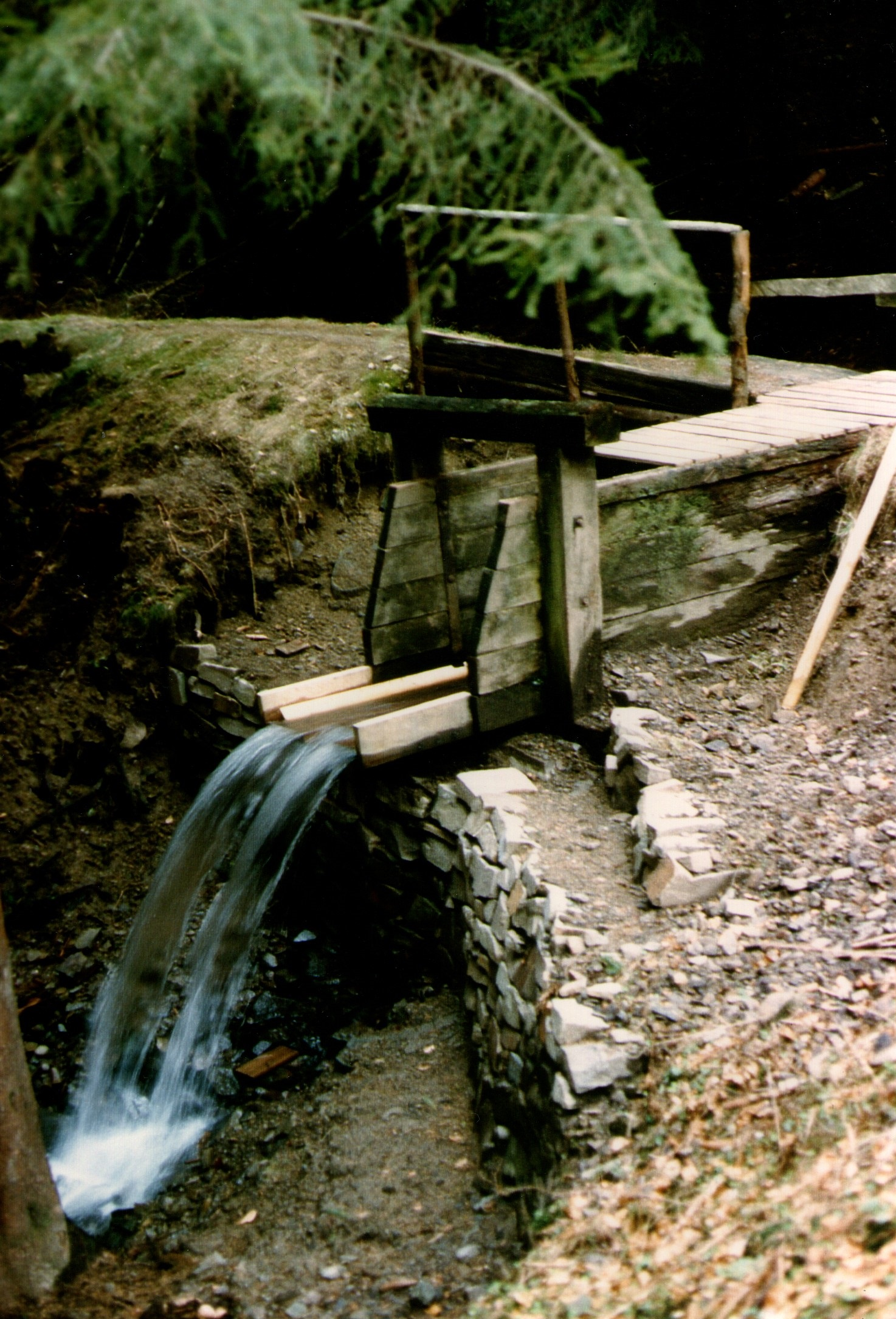 Lautenthaler Kunstgraben zwischen Lautenthal und Wildemann